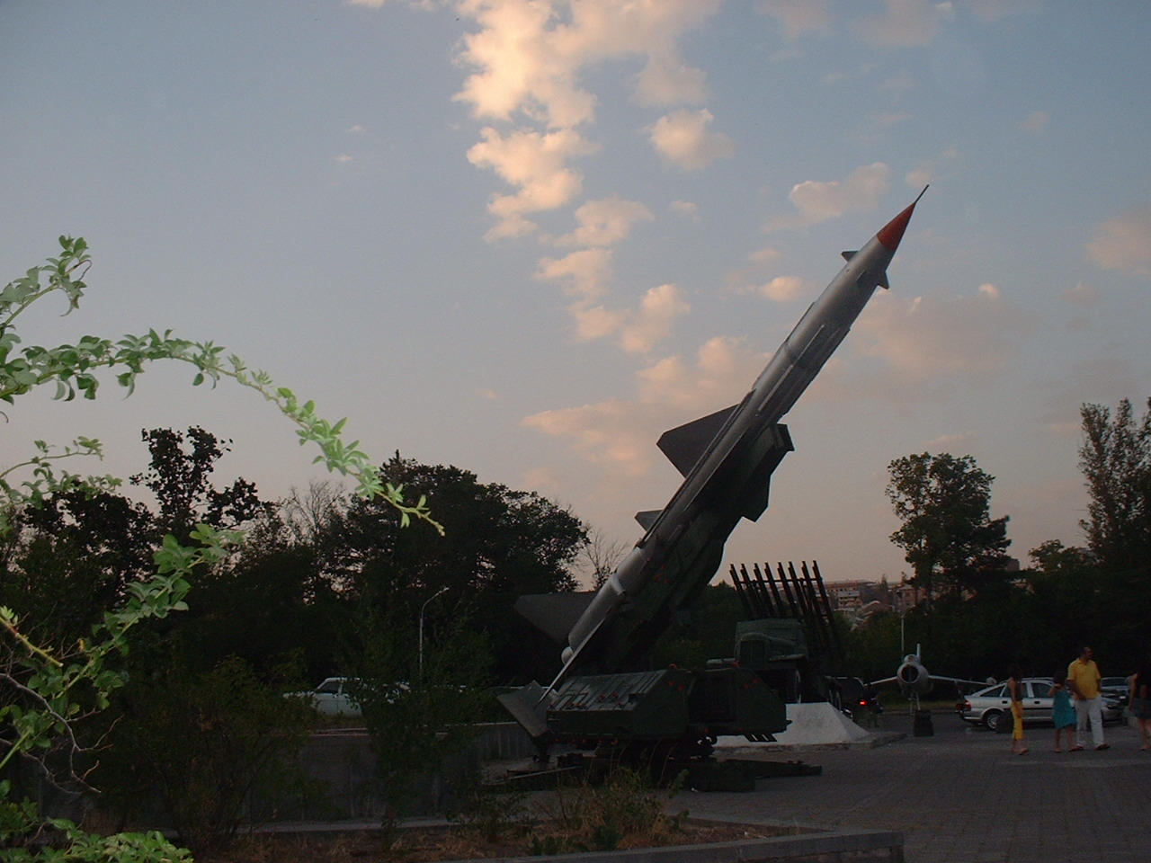 Missile SA-2 avec en arrière plan d'autres équipements militaires. Photo prise au pied de la statue Mayr Hayrenik, dans le parc de la Victoire à Erevan.